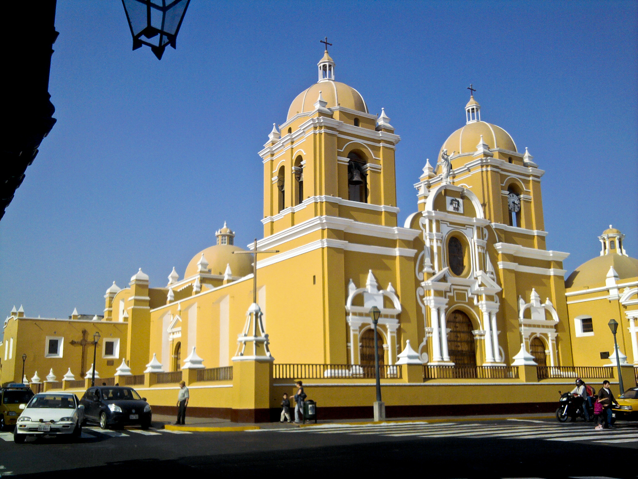 Catedral de la ciudad de Trujillo - Perú